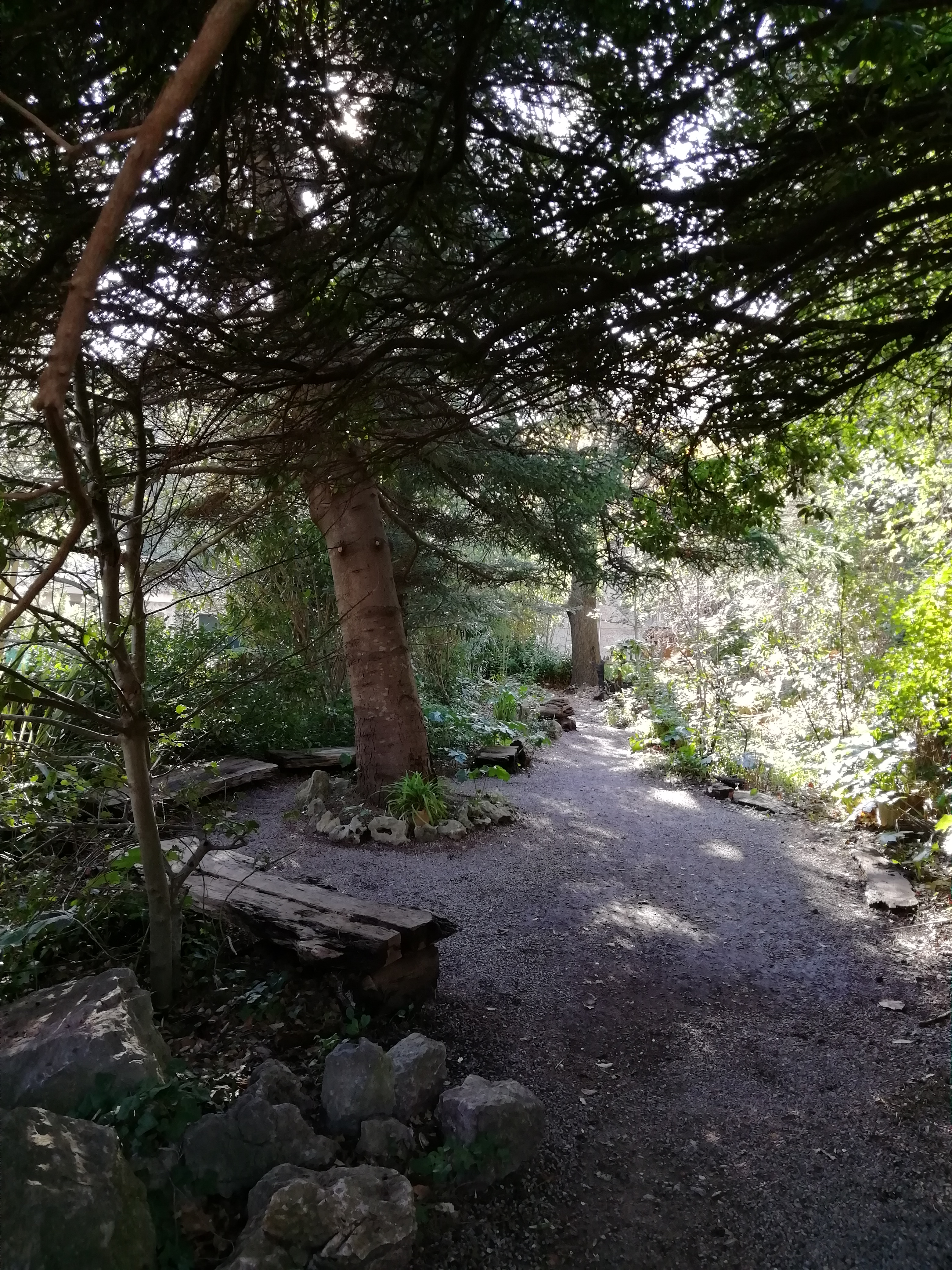 Jardín del monasterio de Lluc, Mallorca.